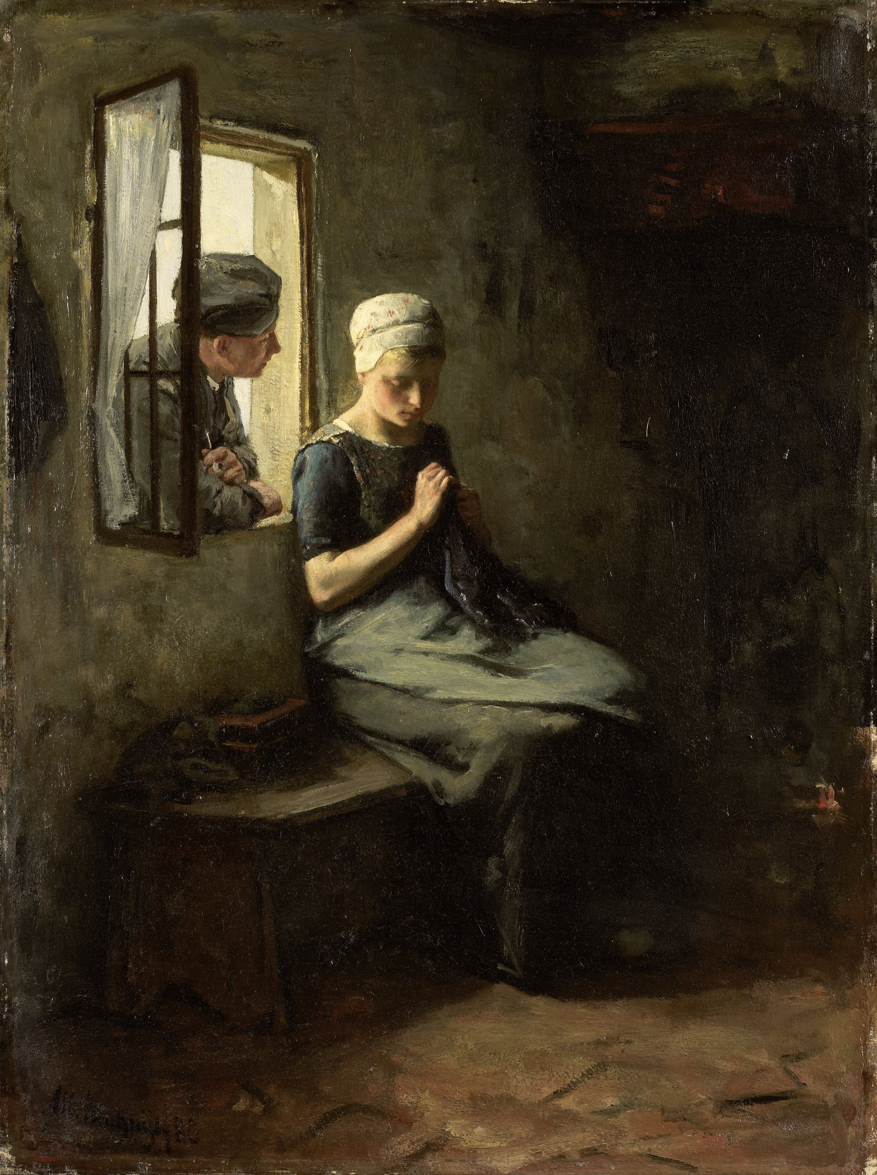 Voorstelling getiteld 'Vissersvrijage'. Een jonge vrouw naaiend op een bankje bij het raam wordt aangesproken door een jonge man die naar binnen leunt.